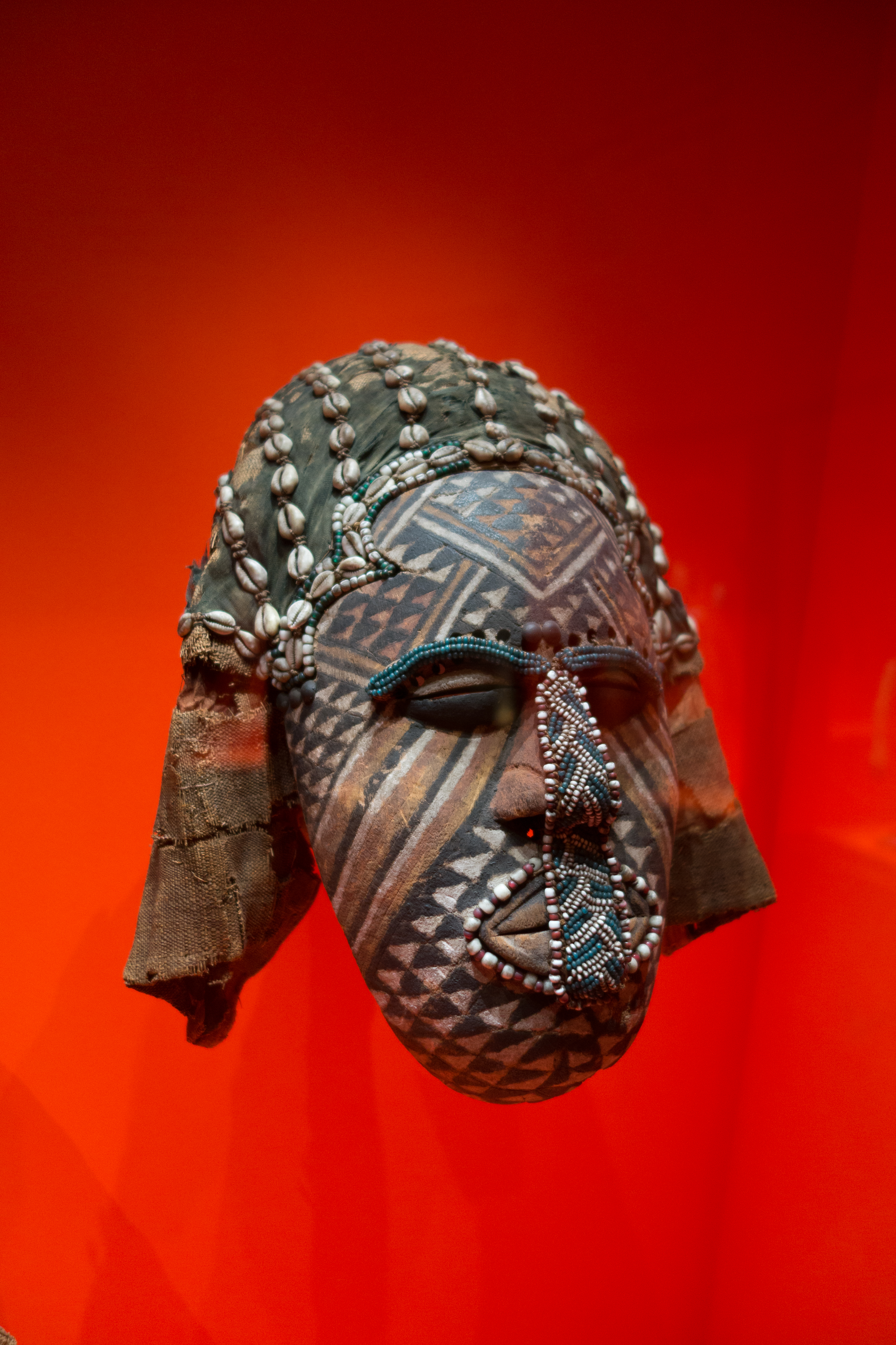 Belgium